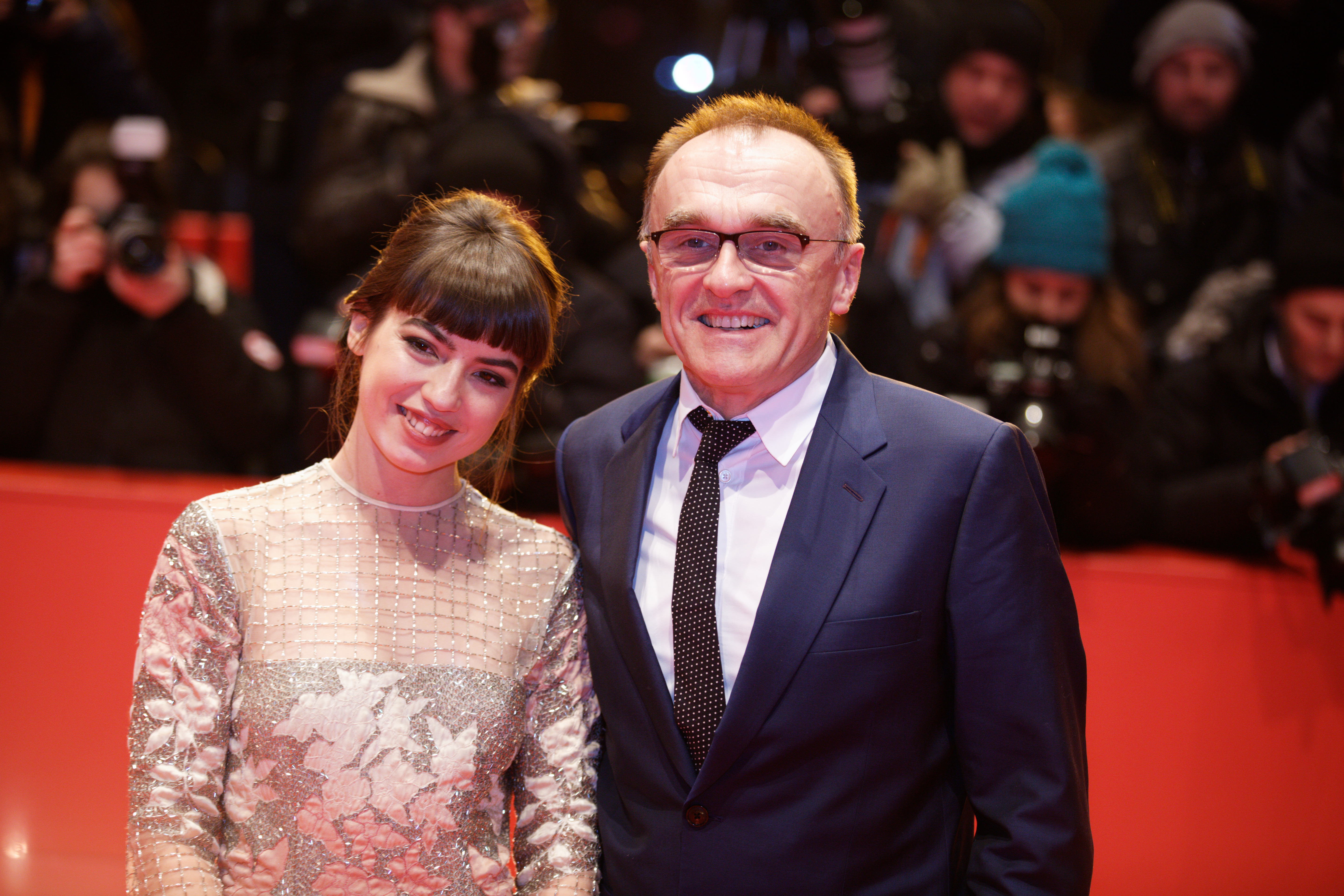 Anjela Nedyalkova und Danny Boyle auf dem Roten Teppich zu T2 Trainspotting im Rahmen der Berlinale 2017